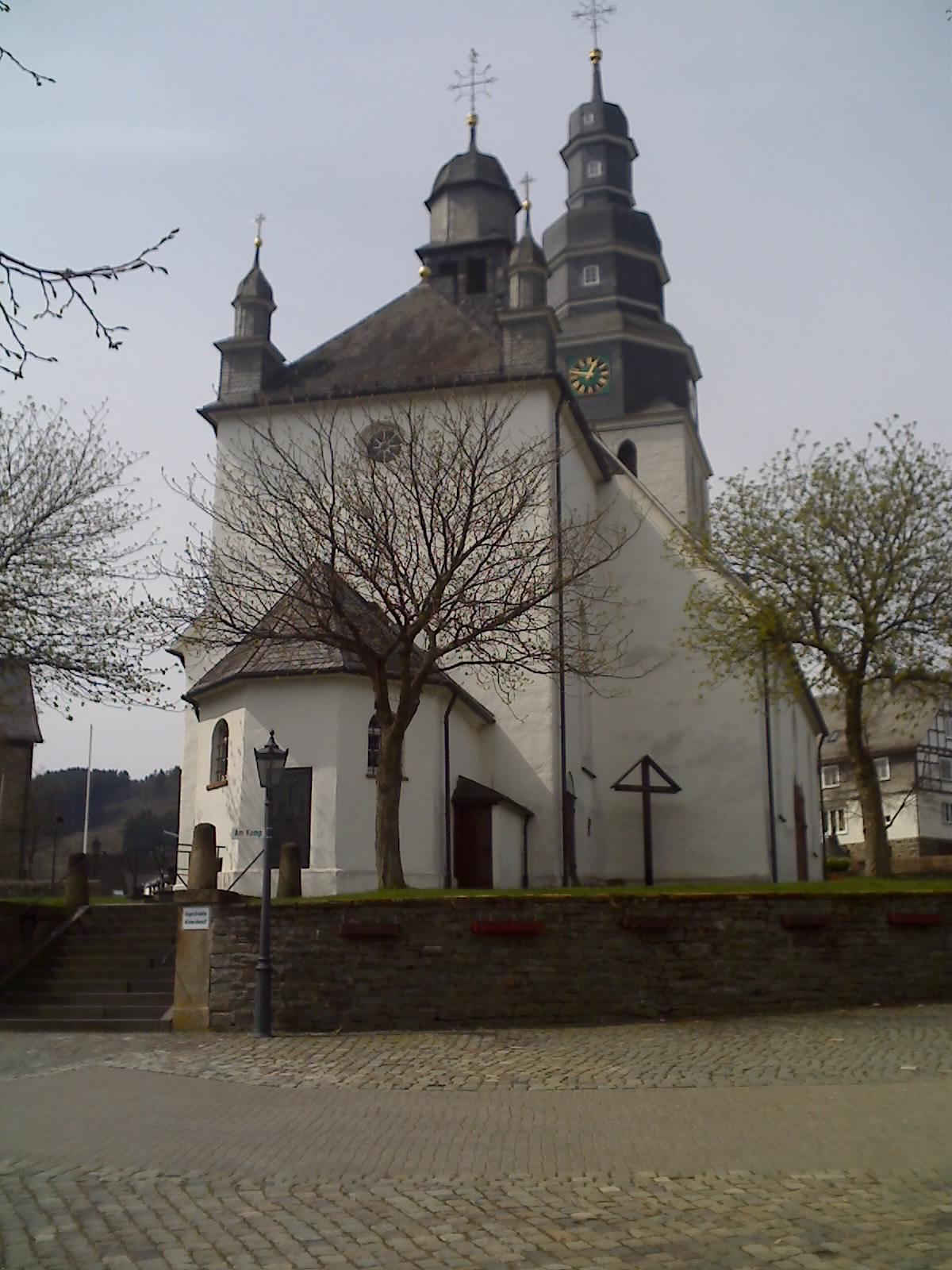 Pfarrkirche St. Heribert (Hallenberg, Hochsauerland)